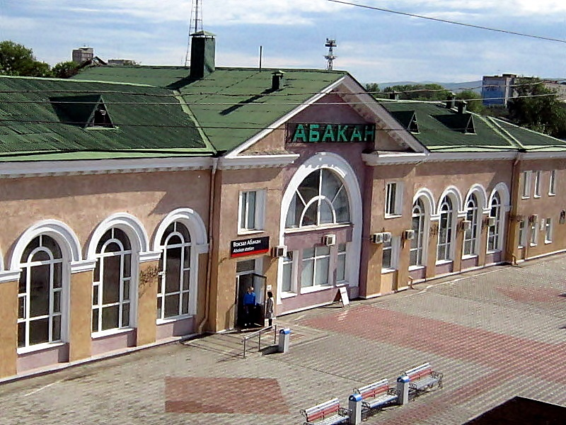 Абакан. Железнодорожный вокзал.